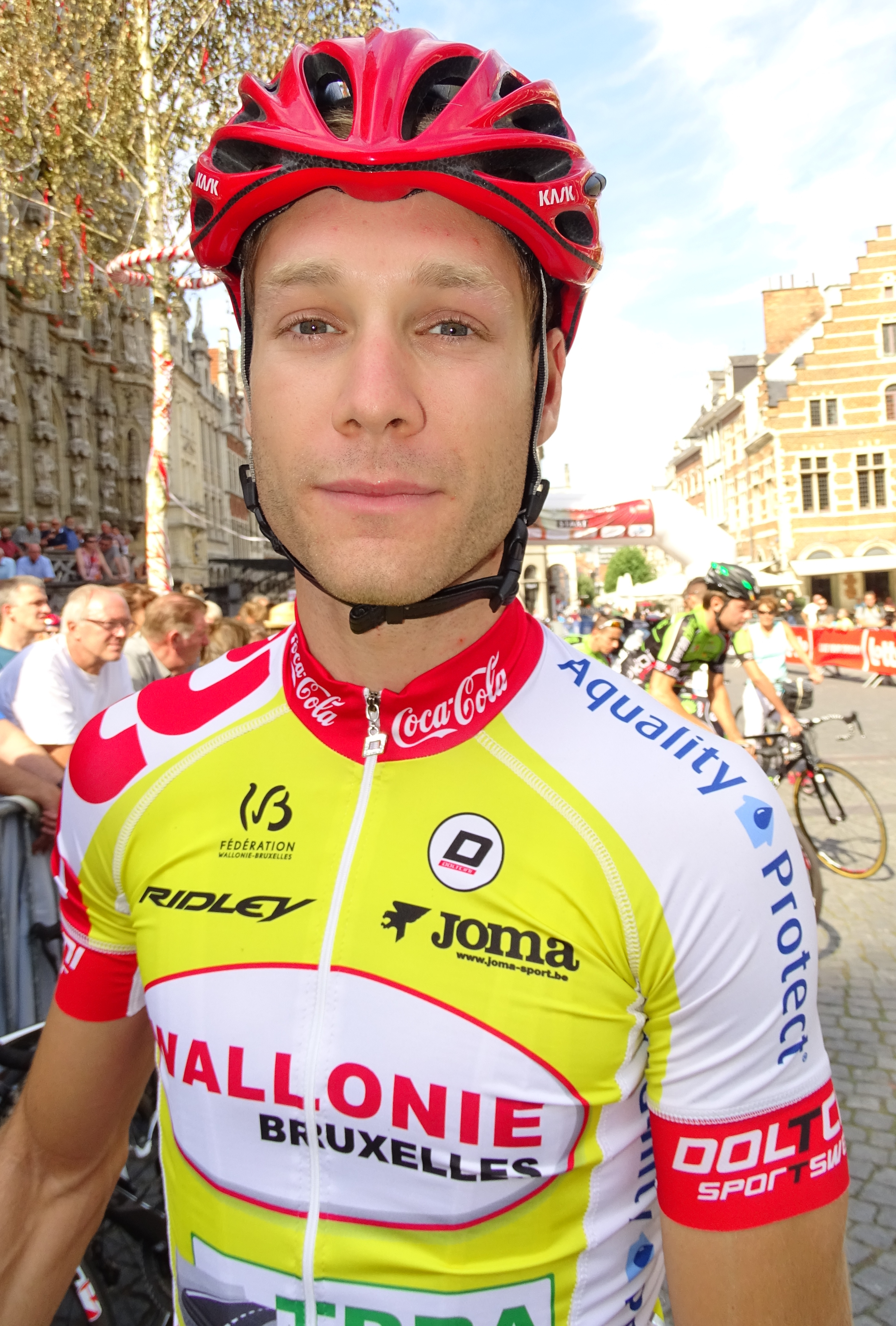 Reportage réalisé le dimanche 23 août à l'occasion du départ et de l'arrivée du Grand Prix Jef Scherens 2015 à Louvain, Belgique.